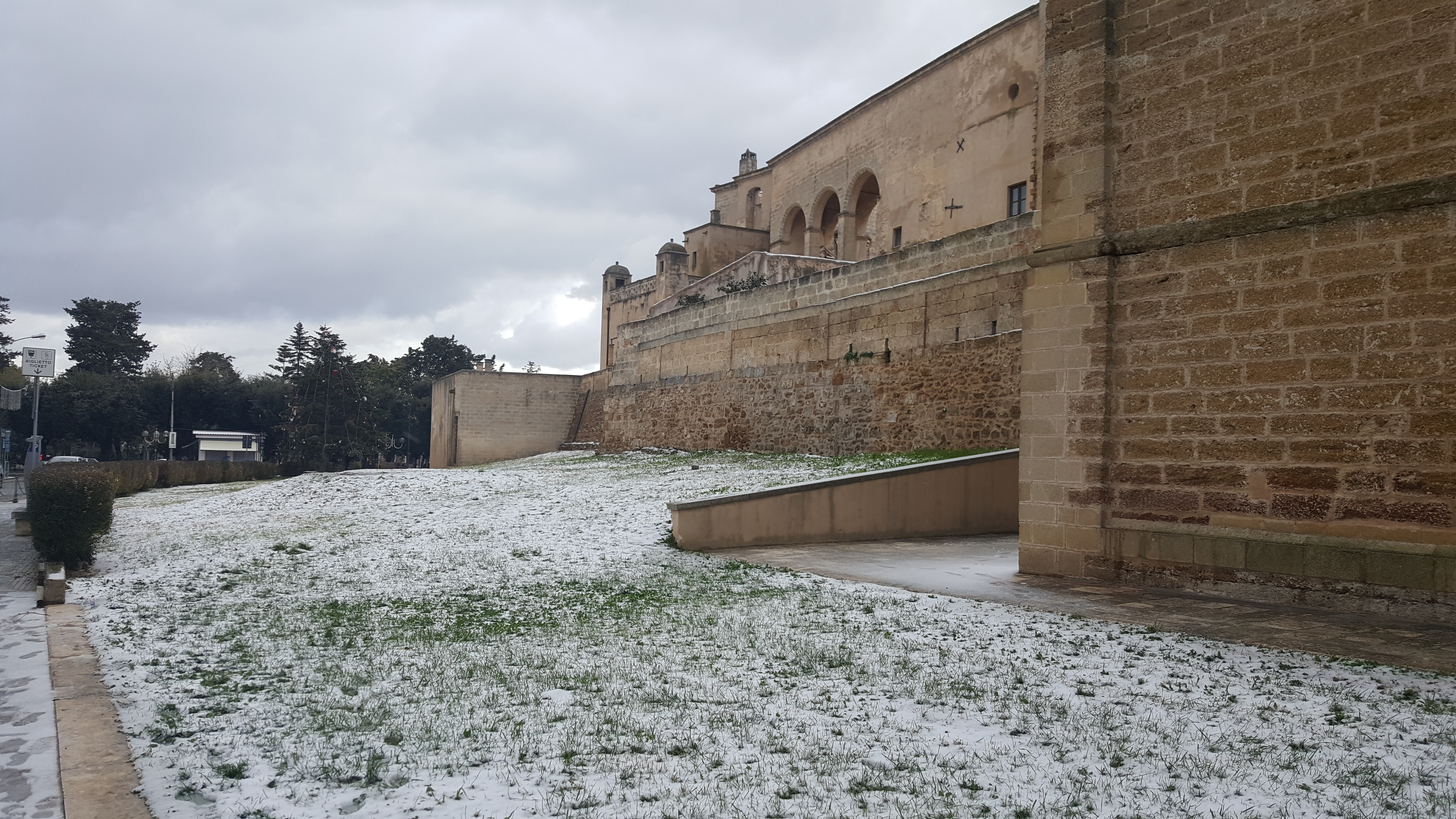 Snow in Mesagne, Salento - Apulia, Italy